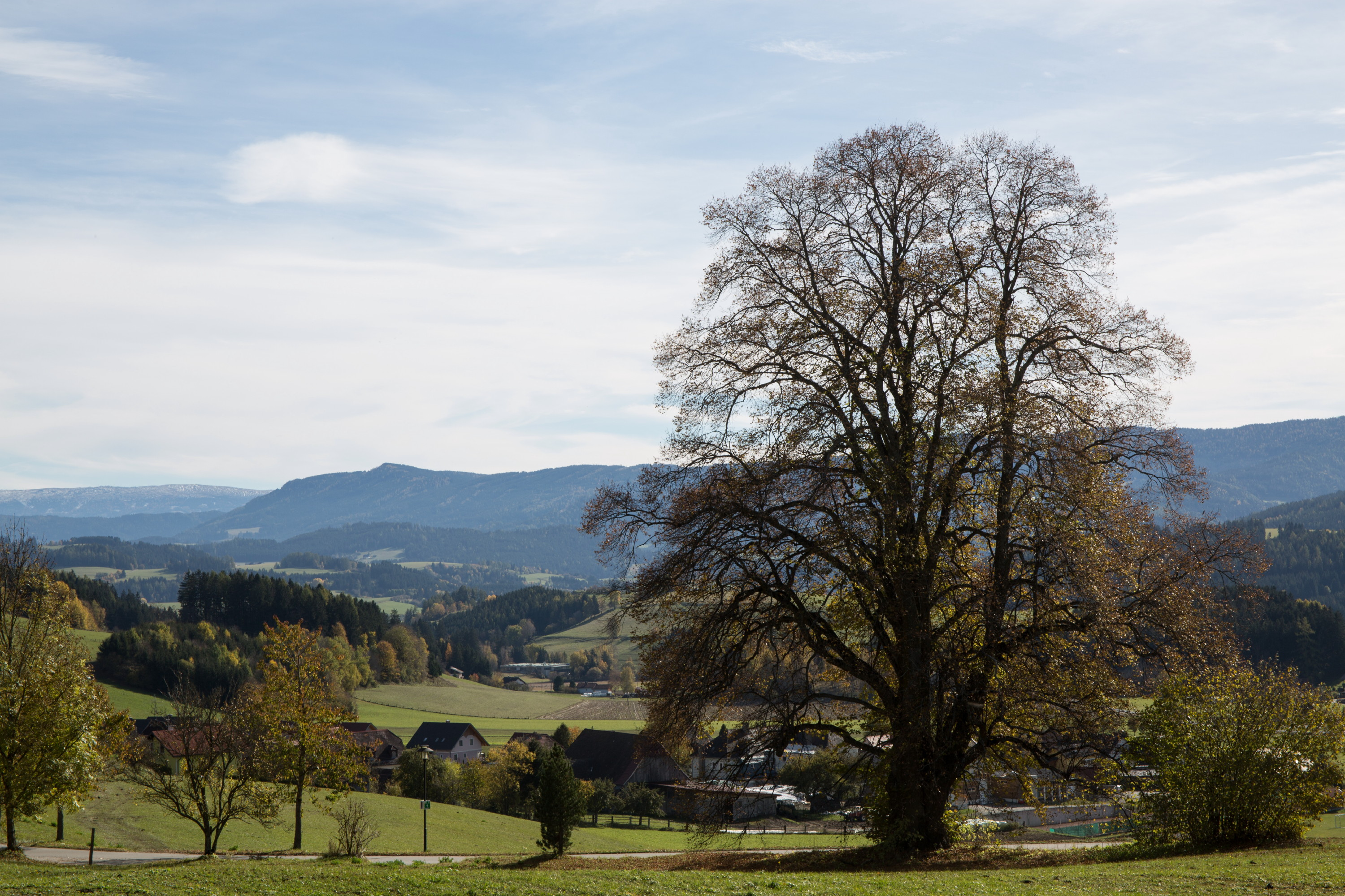 Sommerlinde (Tilia platyphyllos) This media shows the natural monument in Styria with the ID 1049.